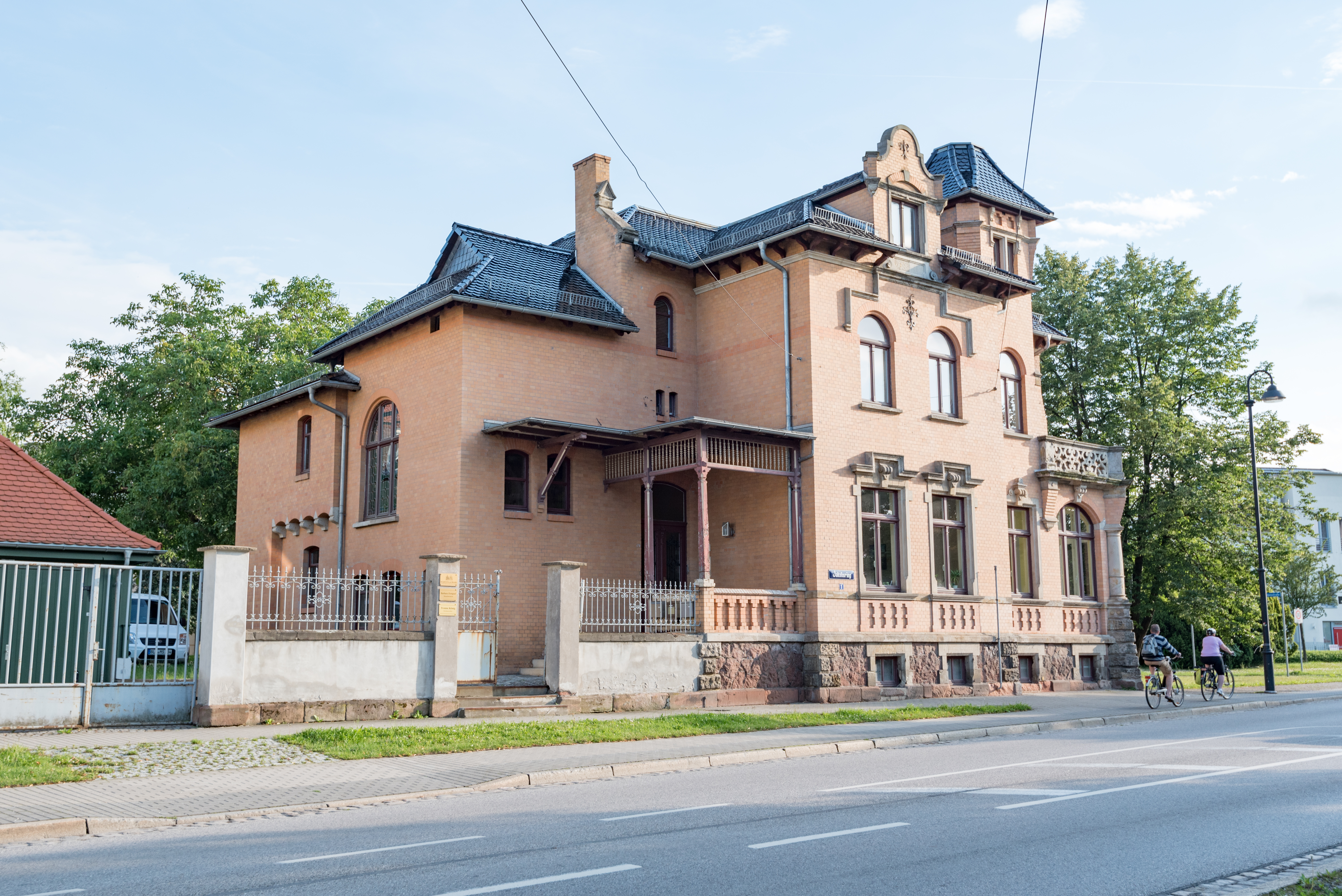 Naumburg (Saale), Jakobsring 1